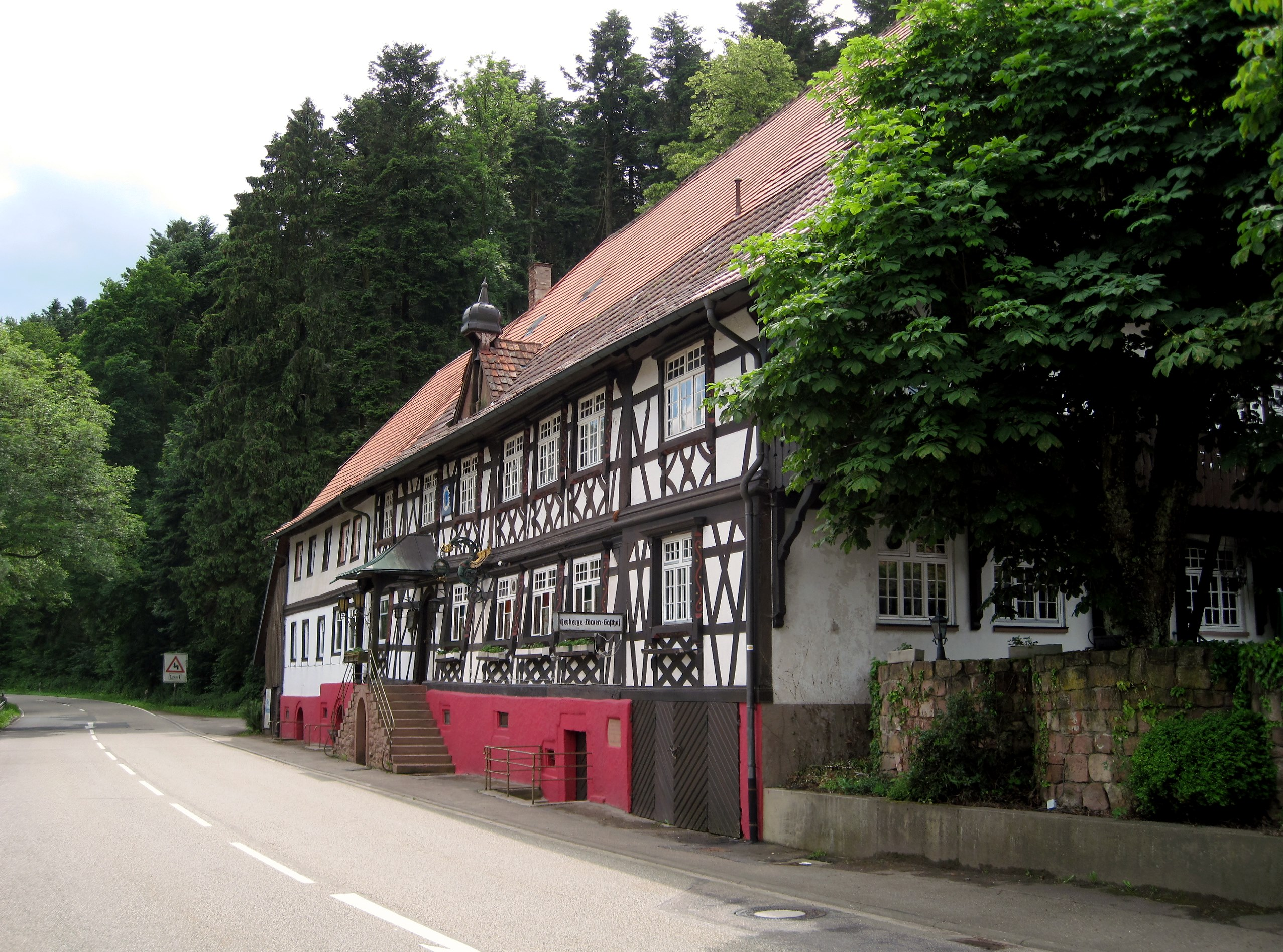 „Herberge zum Löwen“ (Gasthaus Löwen), Ludwigstraße 1 in Seelbach-Schönberg. Hinweistafel am Gebäude: Ehemalige Lehenswirtschaft der Geroldsecker 1242. Als Herberge am Berg 1370 urkundlich erwähnt.